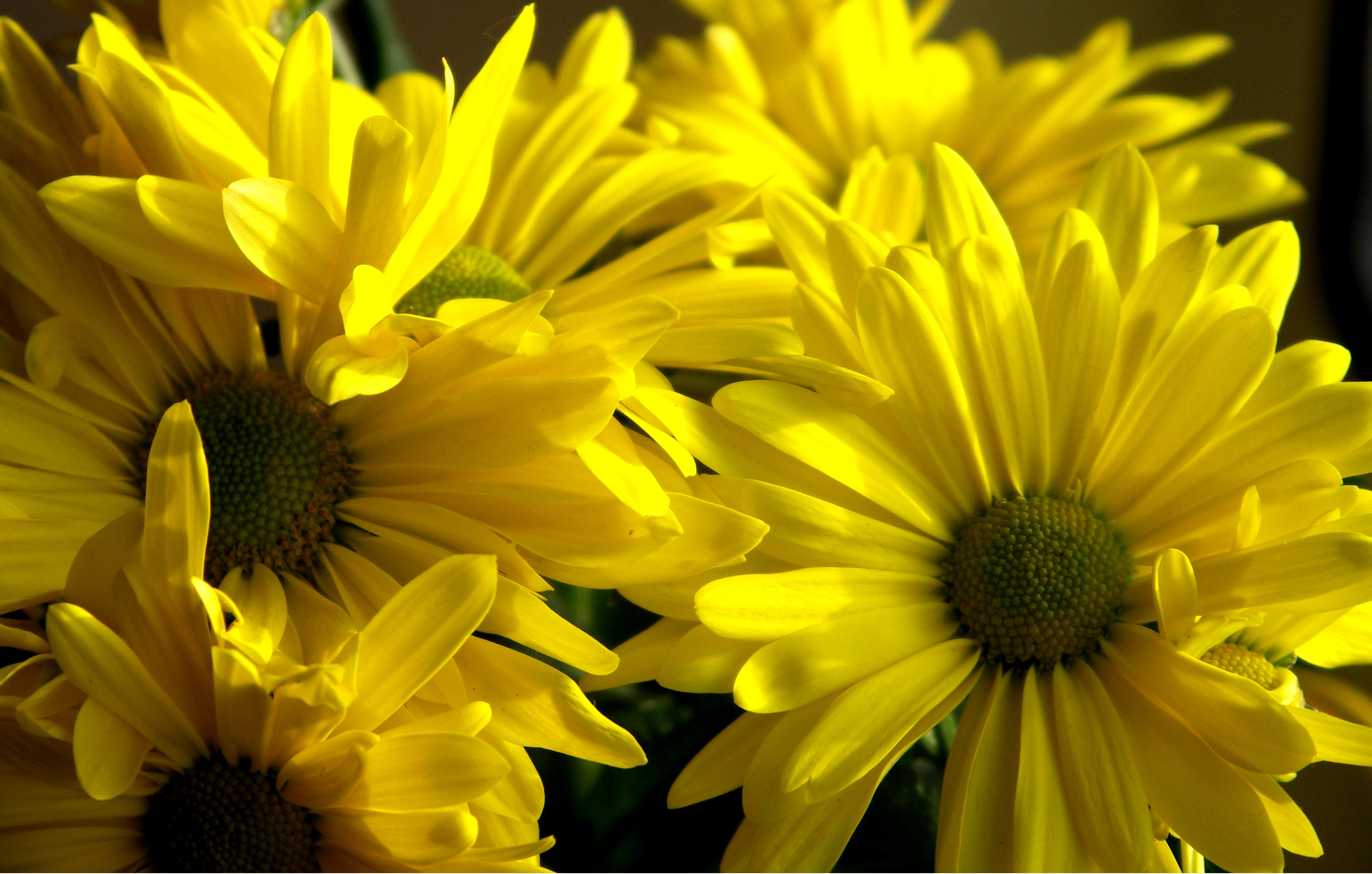 Daisies (Bellis perennis ?)